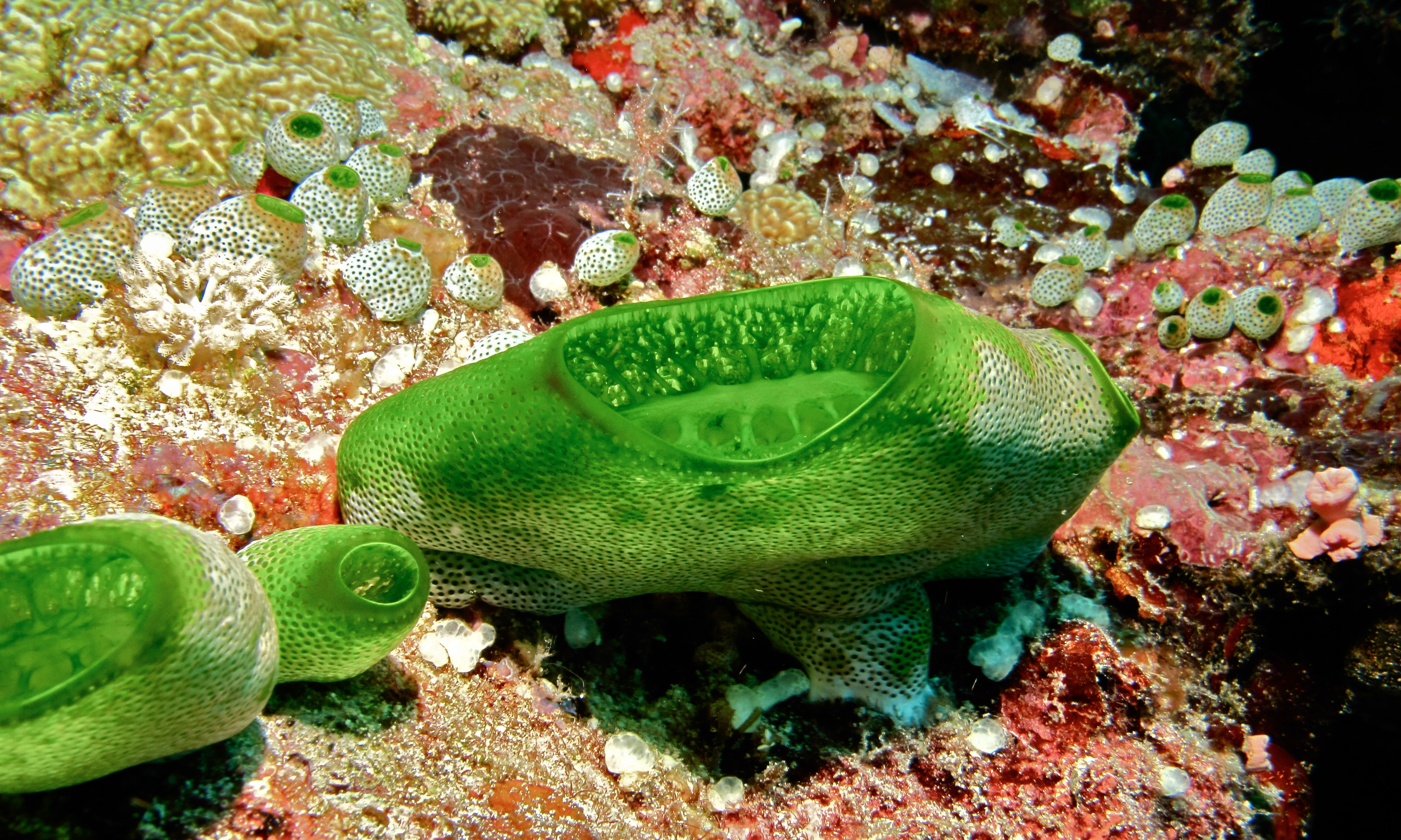 Likuan I, Bunaken Island, Sulawesi, INDONESIA